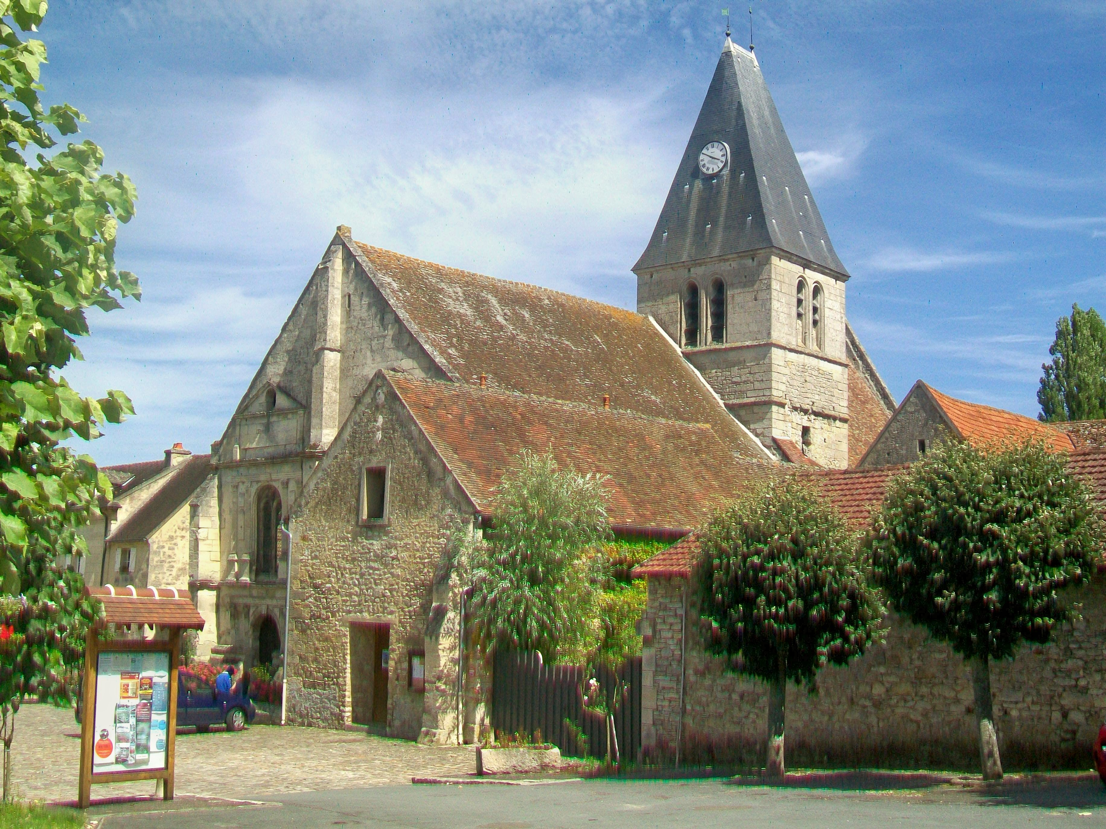 L'église Saint-Pierre depuis l'ouest.